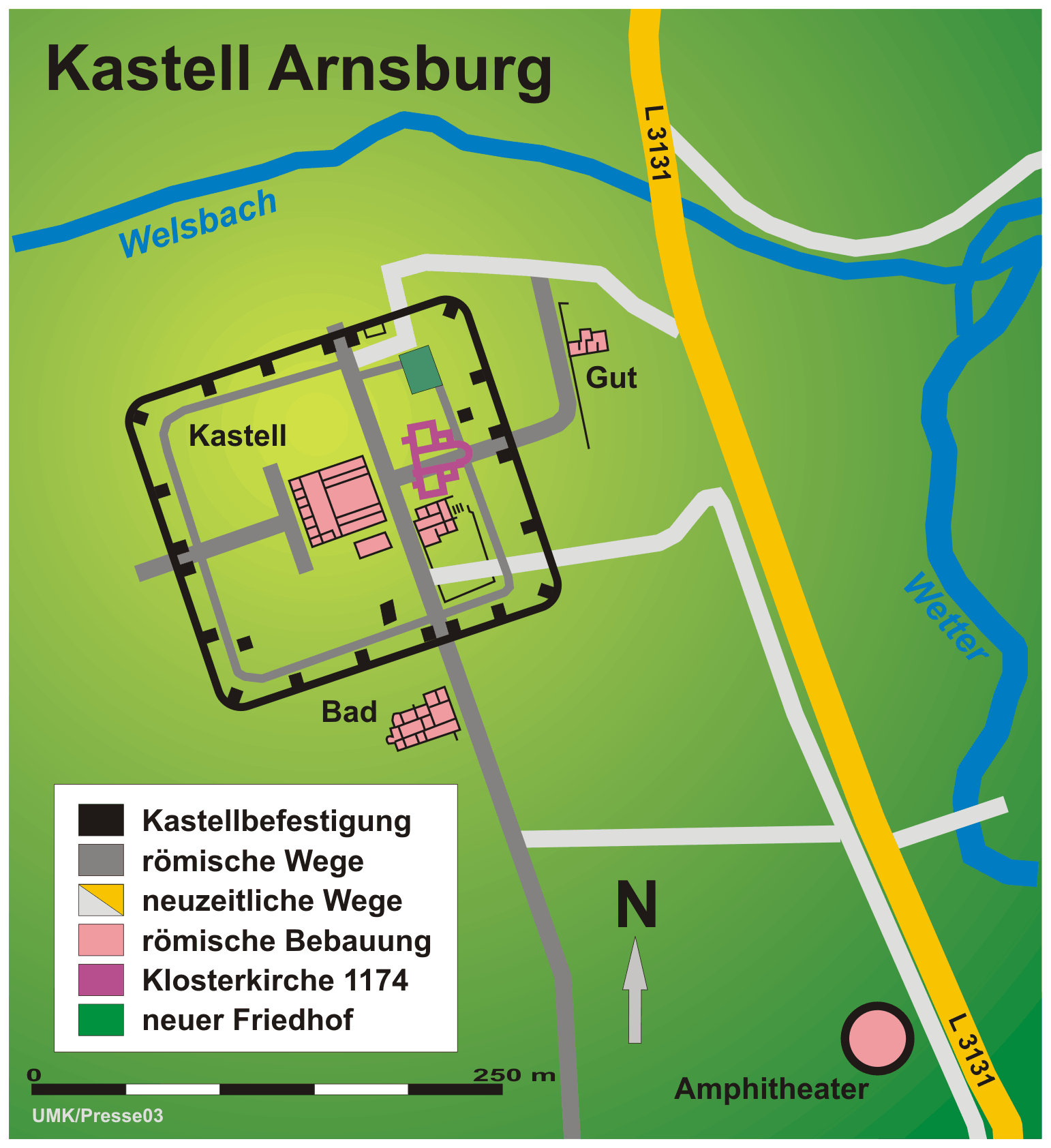 Lageplan des römischen Kastells Arnsburg-Alteburg am obergermanisch-raetischen Limes, Wetterau, Hessen, Deutschland